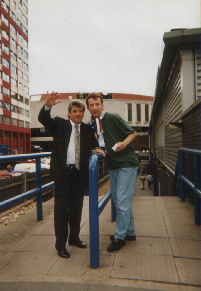 Kevin Keegan mit Fan aus HSV-Zeiten